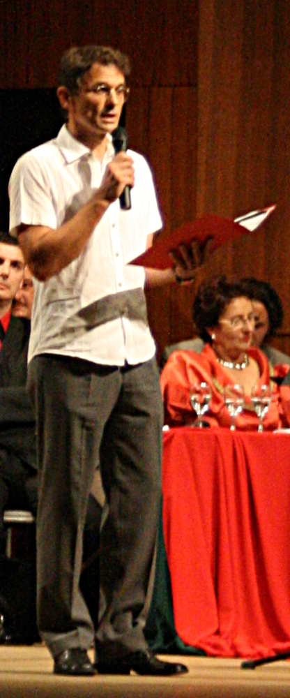 Dobrotvorni koncert "Križ nek' ti sačuva ime" u koncertnoj dvorani Vatroslav Lisinski u Zagrebu.